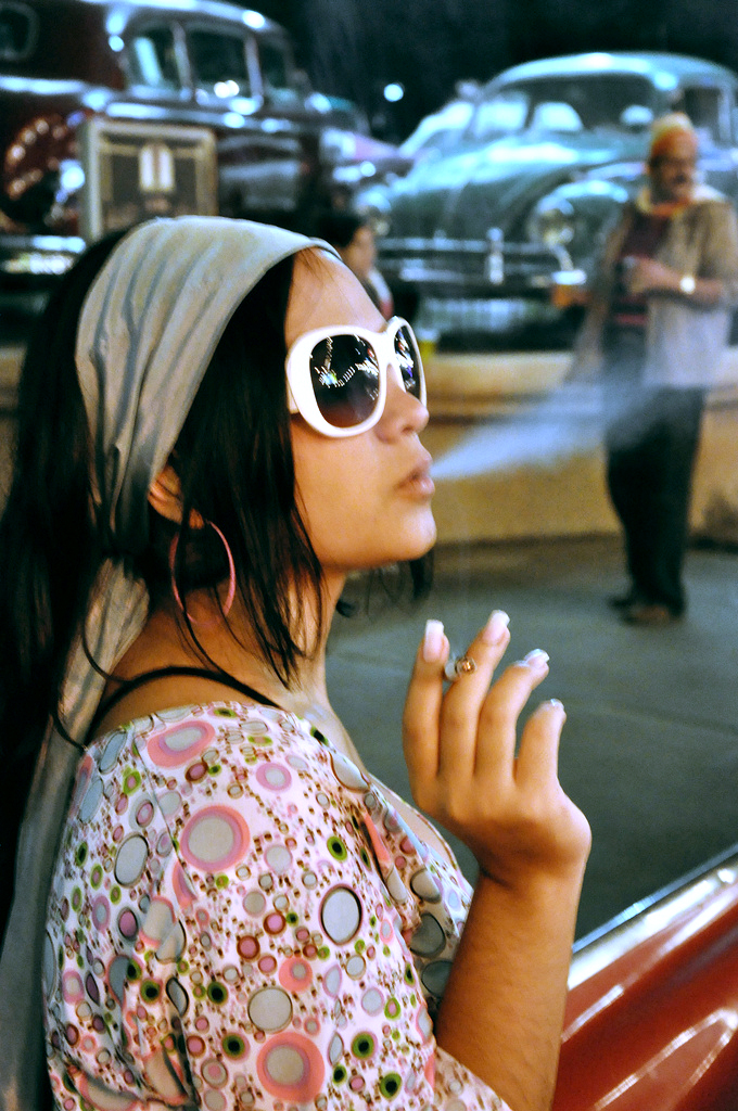 Un cigarrillo por favor… Después del sexo, después de la comida, con un café y un libro, para disfrutar cualquier paisaje... Modelo: Laura Chacin. Merida - Venezuela